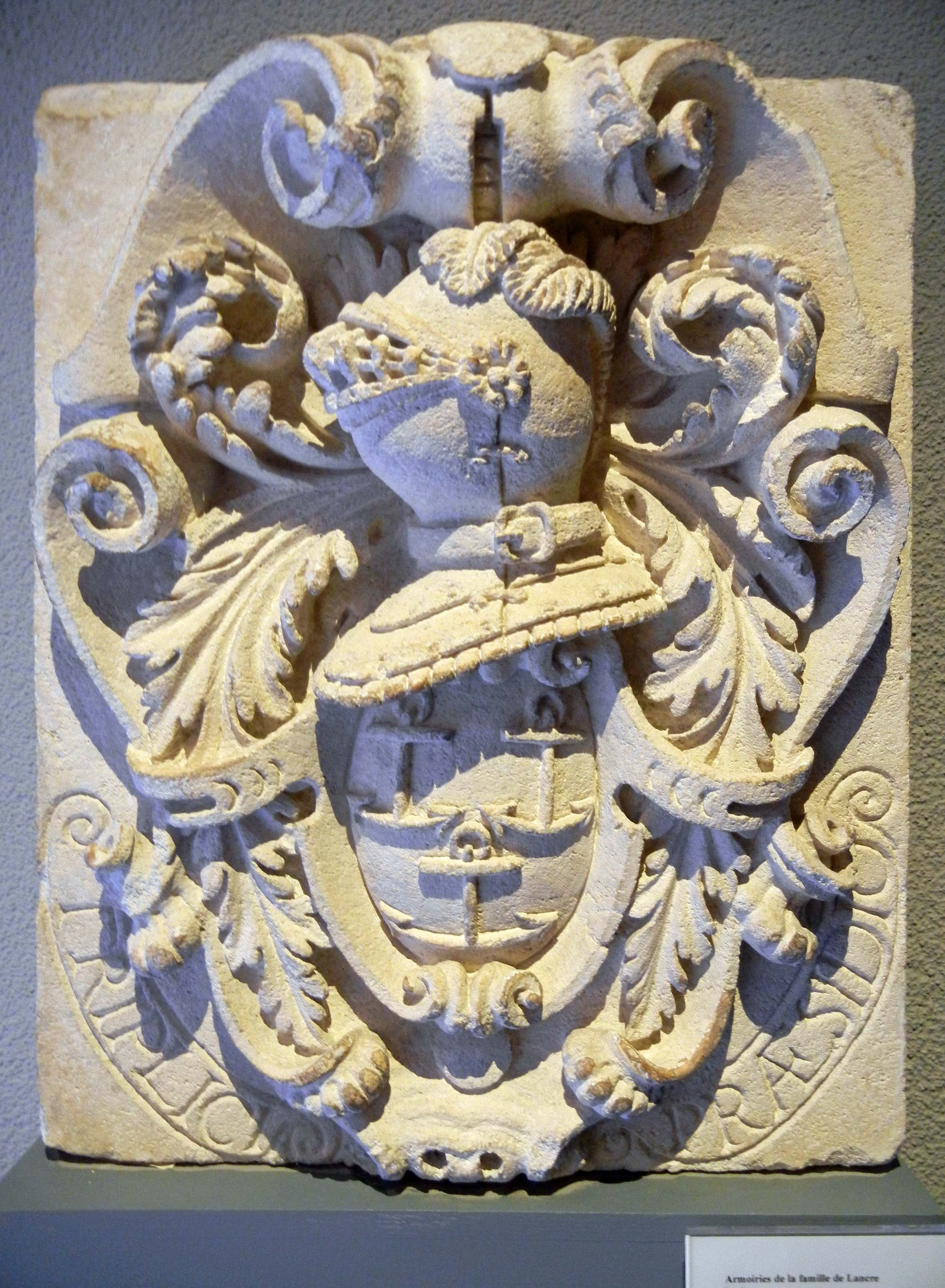 Bordeaux, musée d'Aquitaine, armoiries de la famille de Lancre, XVIIe